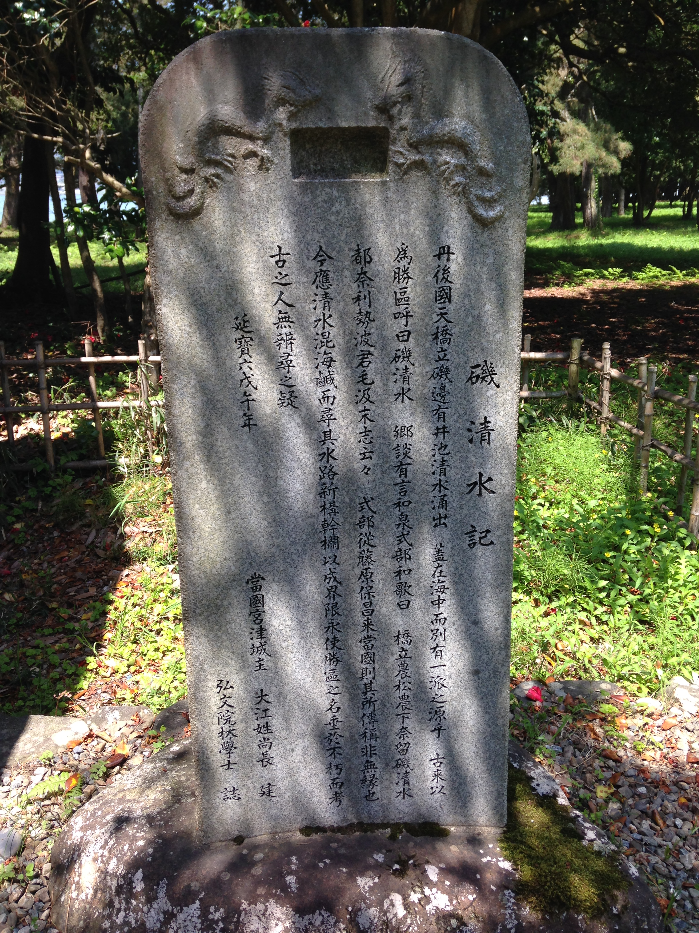 磯清水旁的磯清水記石碑